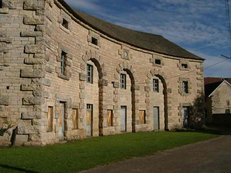 Forges de Baignes